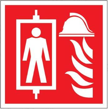 Пиктограмма Лифт для пожарных (Россия)